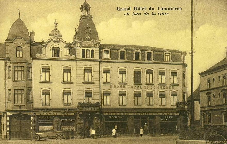 Luxembourg, Hôtel Kons, renommé temporairement Hôtel du Commerce en 1910